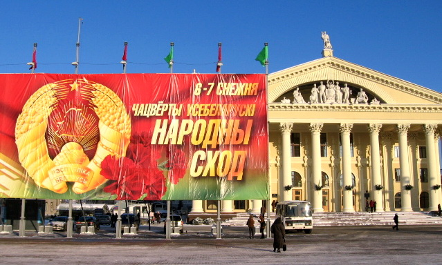 Транспарант на Октябрьской площади, Минск